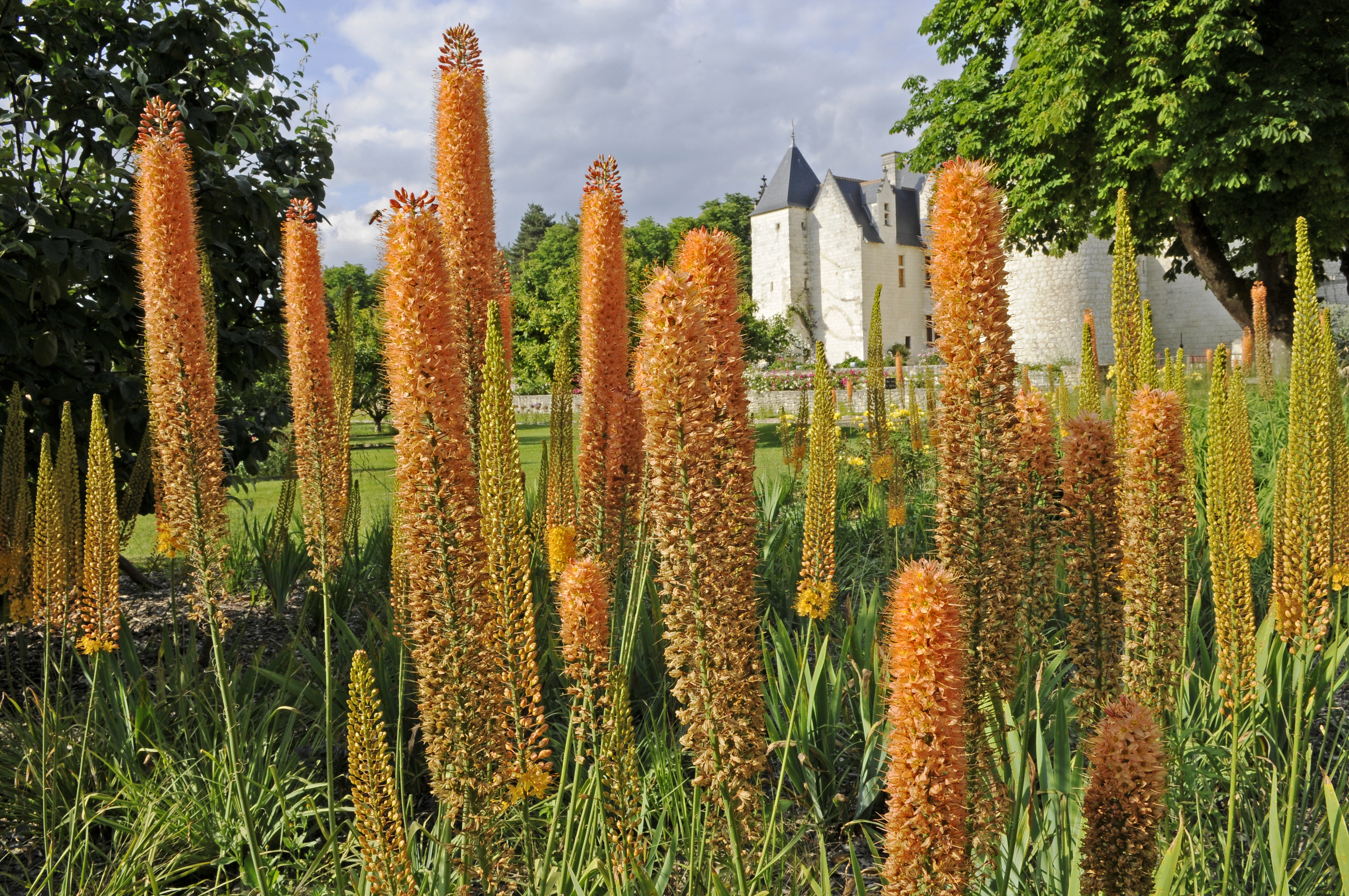 Chateau du Rivau, dans le Val de Loire, entre Chinon et Richelieu. Pres de Tours, Poitiers et Fontevraud